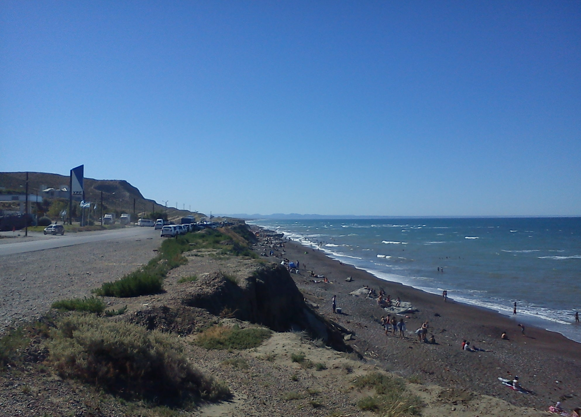 Vista a la ruta y a la playa